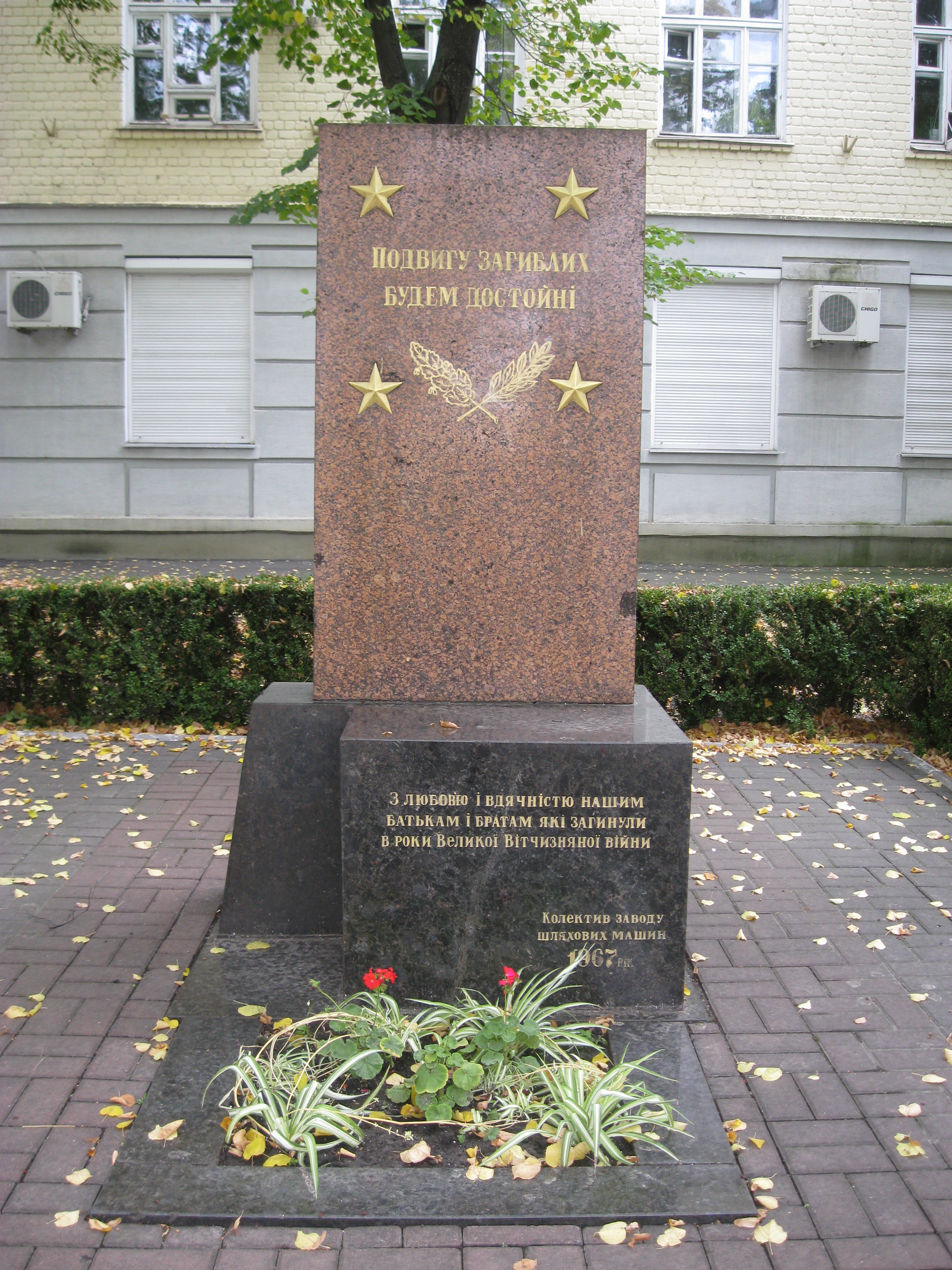 Пам’ятний знак робітникам заводу шляхових машин, які загинули на фронтах Великої Вітчизняної війни, Кременчук, просп. Свободи